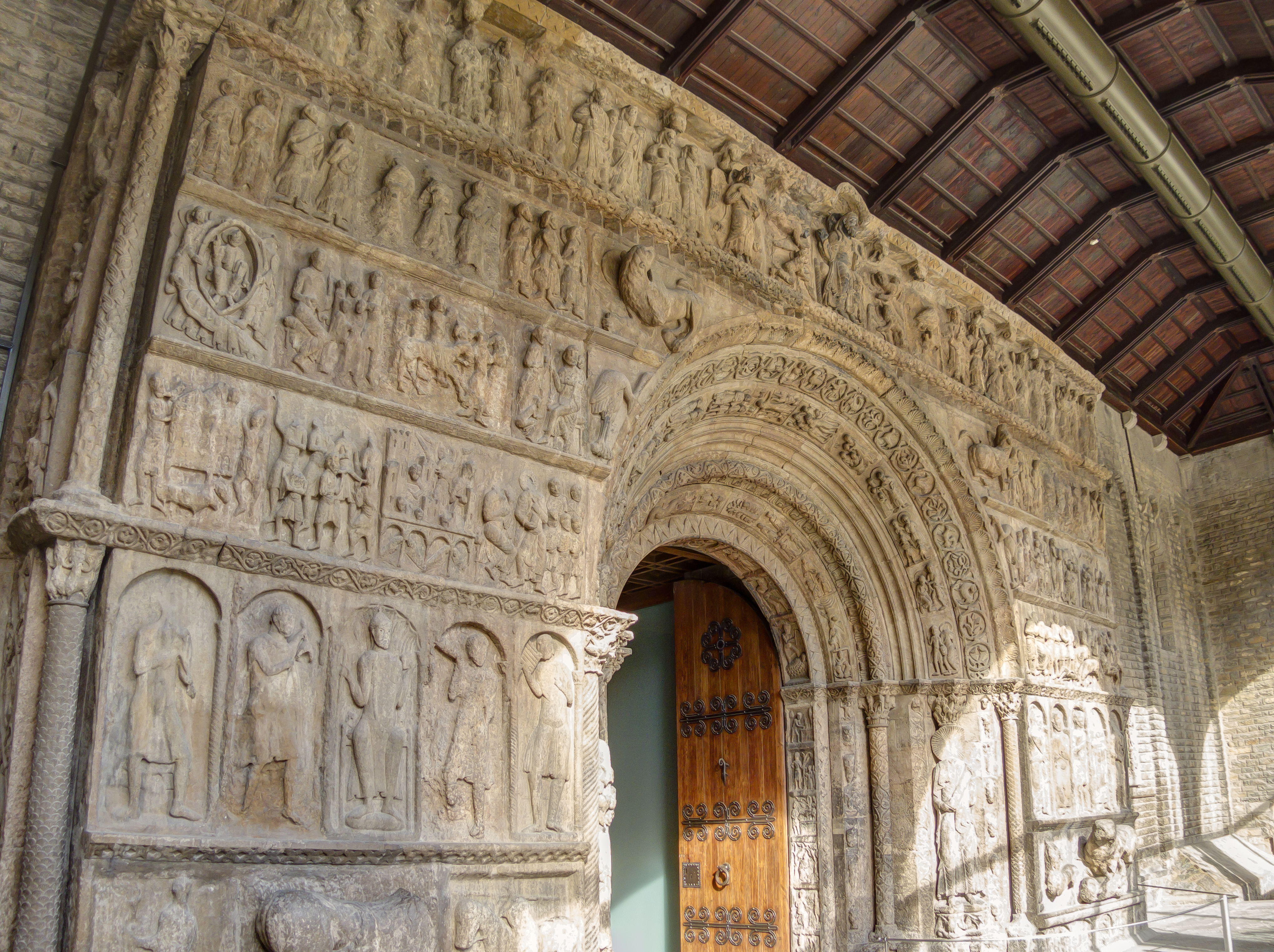 Monestir de Santa Maria de Ripoll_6